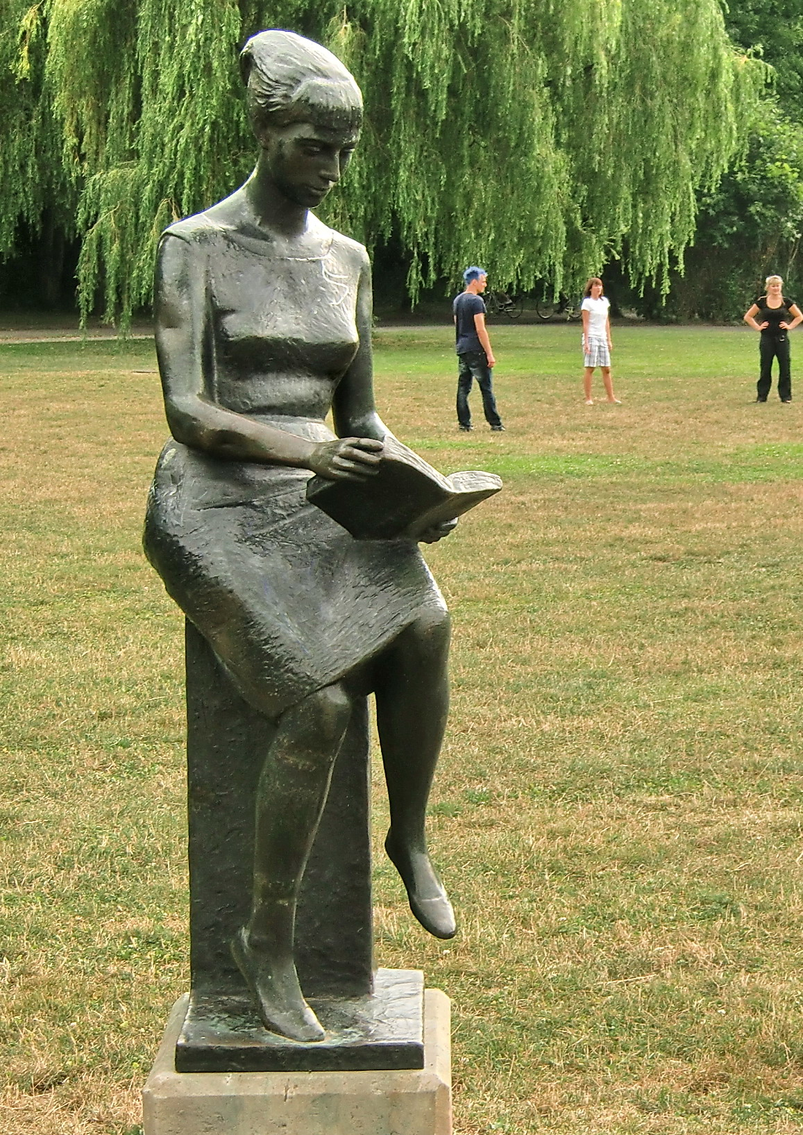 Die Lesende - Plastik von Heinz Beberniß auf der Ziegelwiese in Halle (Saale)